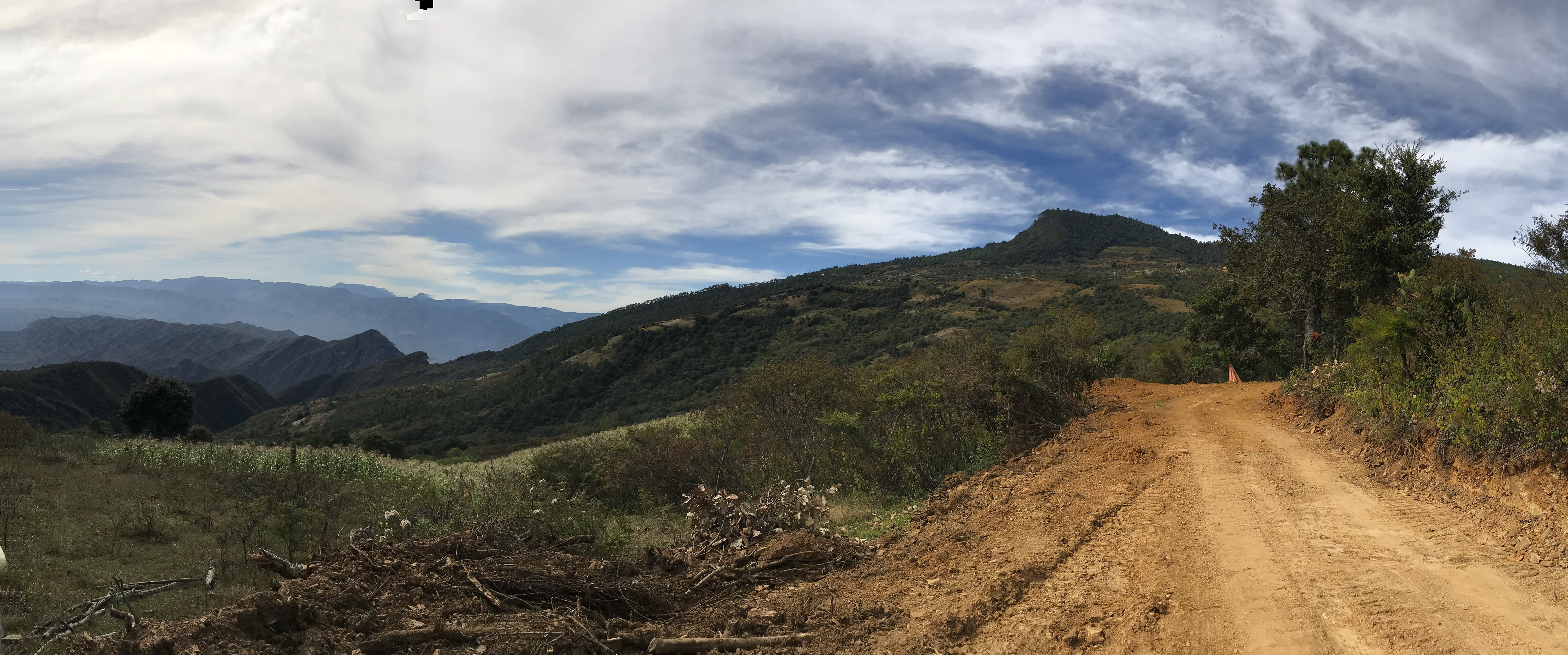 vista desde Loma Temazcal, Tepeuxila Oaxaca